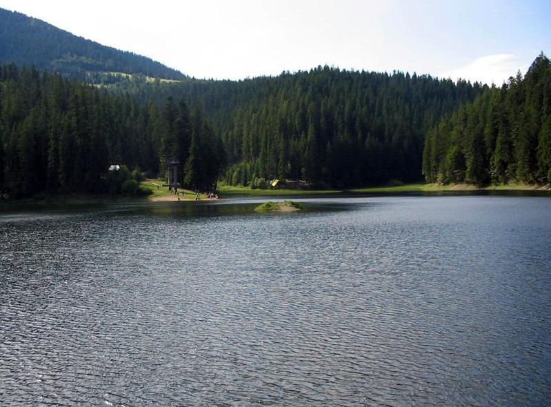 Озеро Синевир